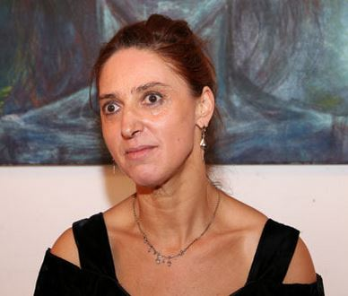 Eva Jansenberger